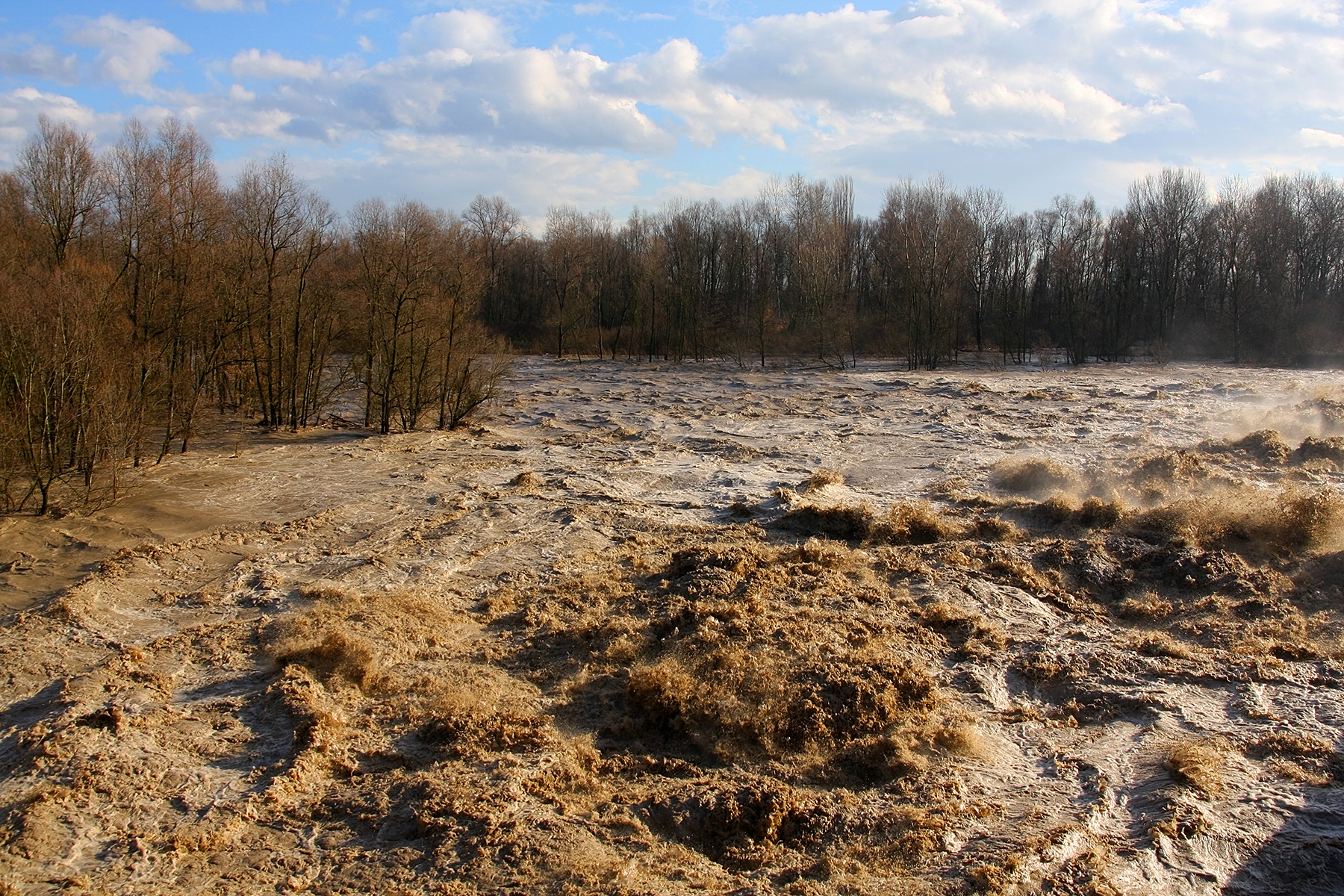 Campogalliano (Modena)